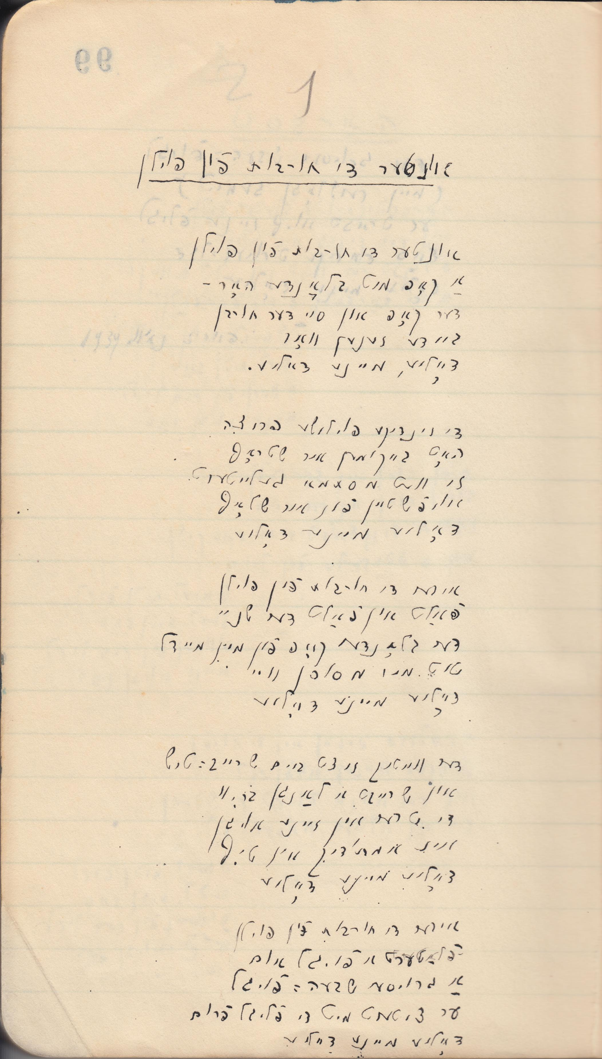 כתב יד של שירו של איציק מאנגר "אונטער די חורבֿות" (I)